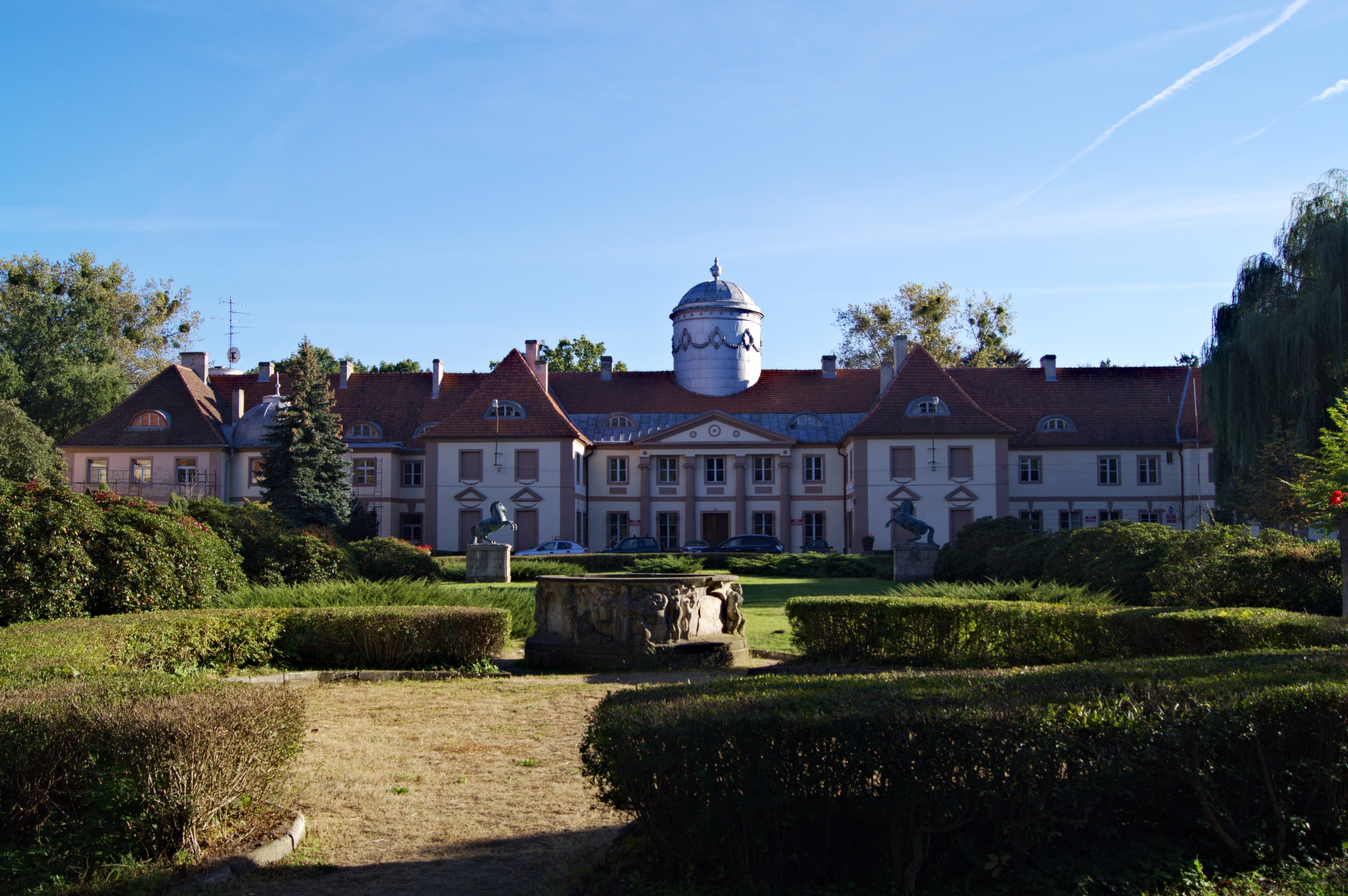 Pałac Maltzanów z domem zajezdnym